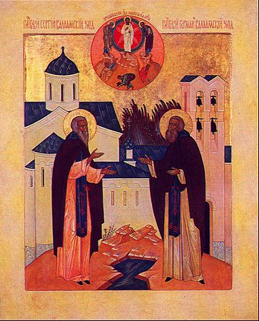 Sergius of Valaam and Herman of Valaam